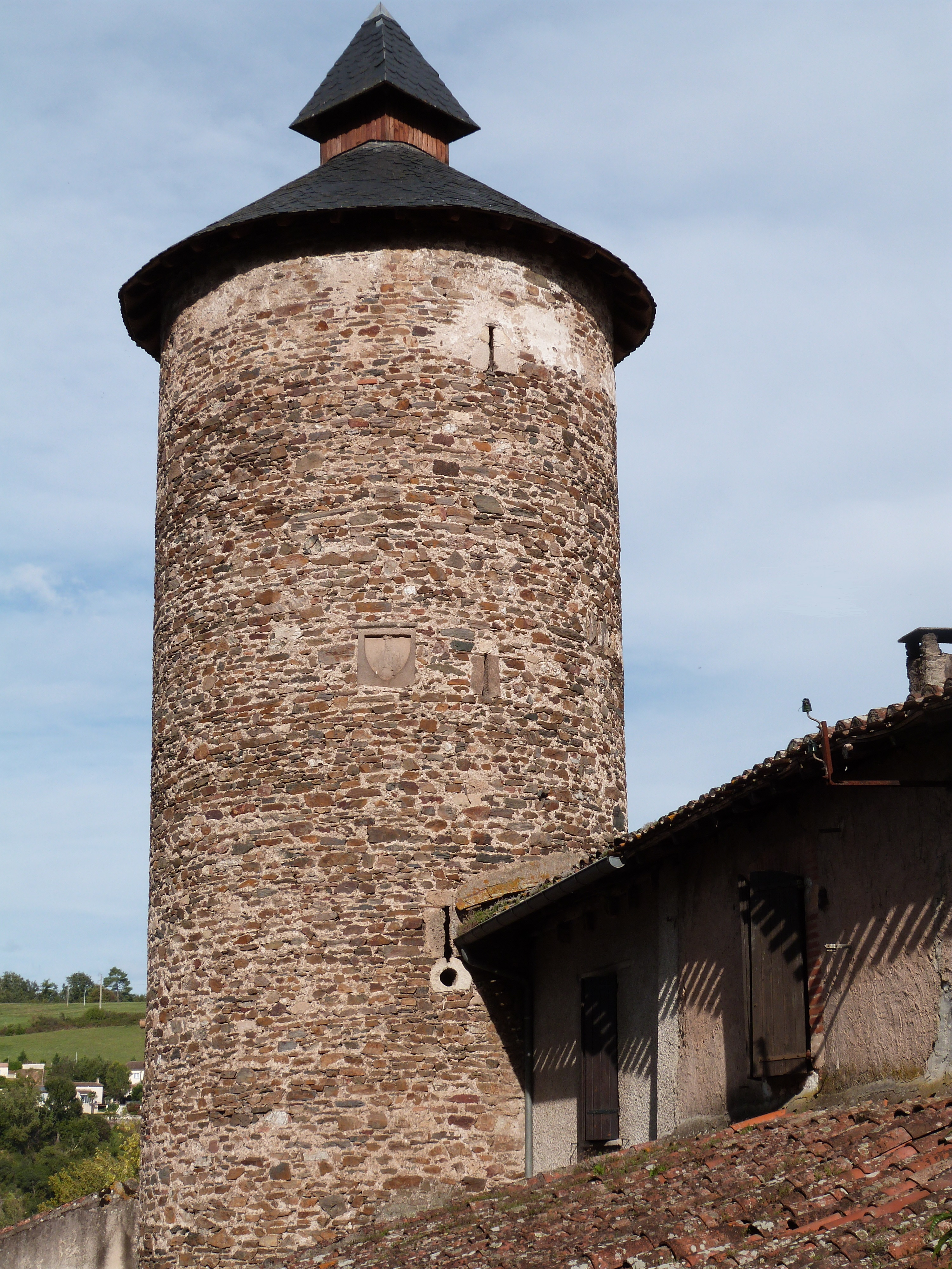 Tour des Avalats